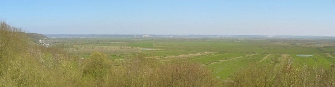 Panorama du Marais-Vernier (Eure)